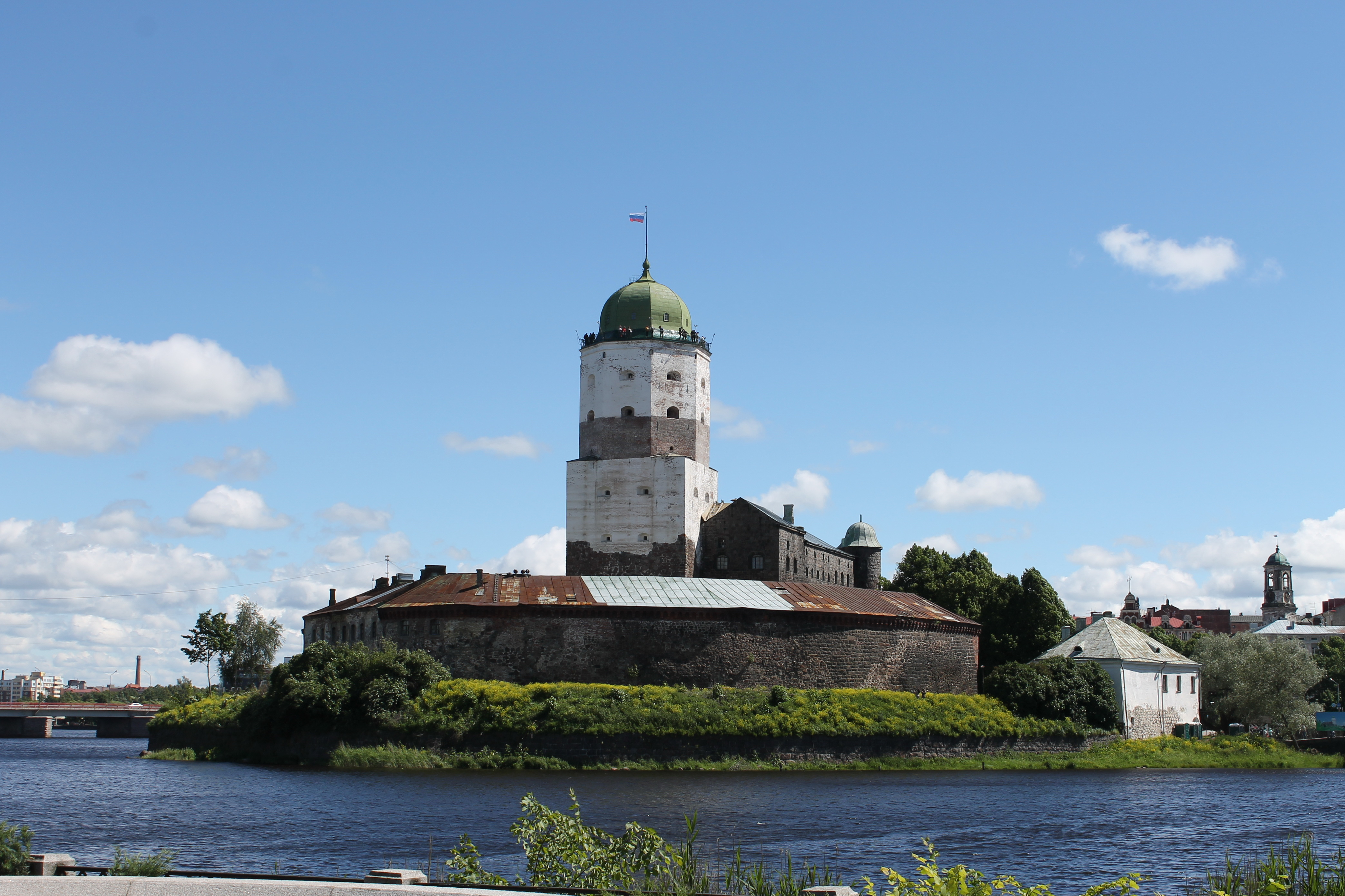 Замок-крепость (комплекс крепостных построек и сооружений на острове) (Лен.область, Выборг, Выборгская слобода, о. Замковый)